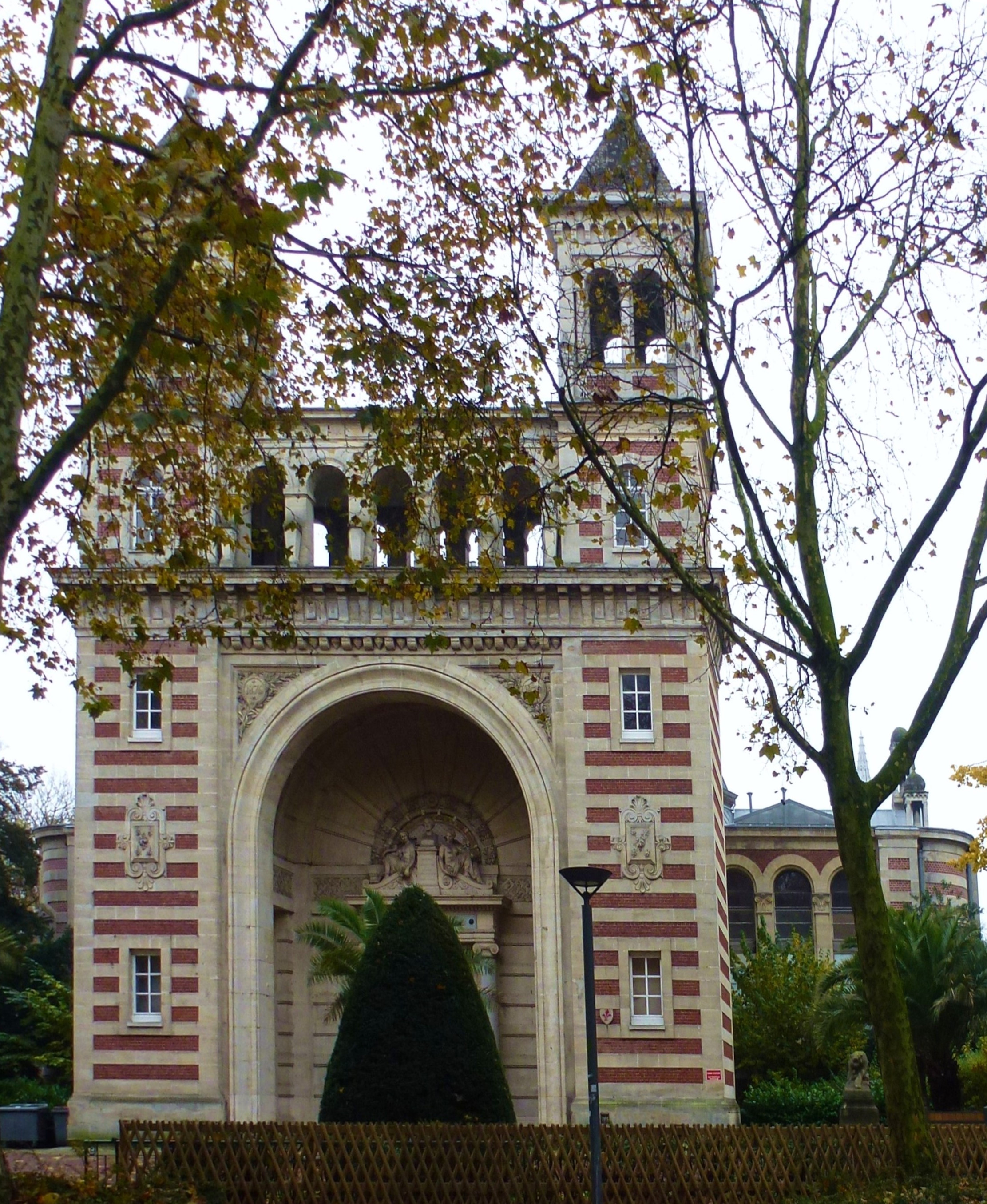 La façade et l'aile droite du Palais Rameau (1881), avec son jardin et sa clôture dans le quartier Vauban de Lille (Nord).- France .